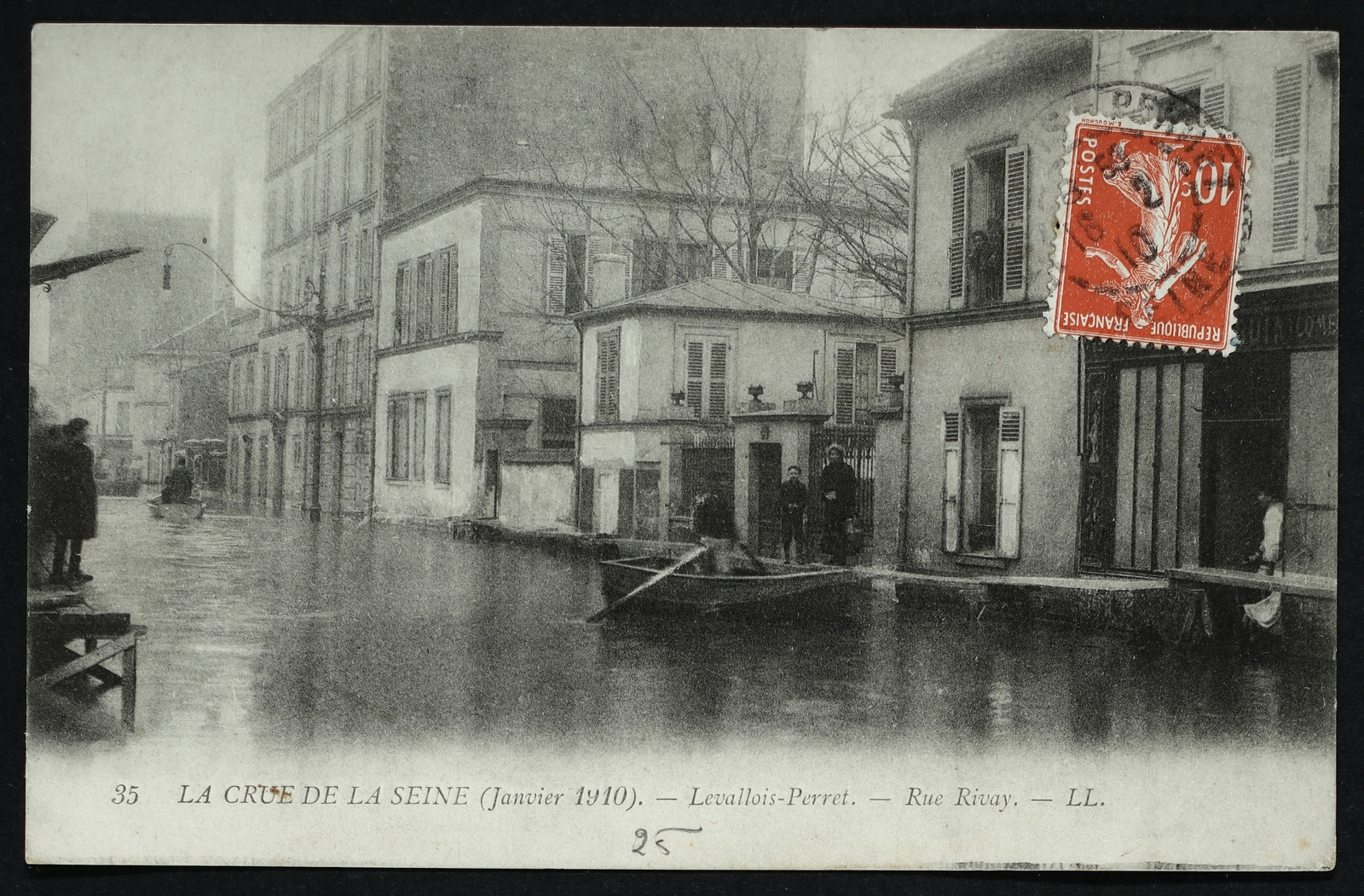 Levallois-Perret.Rue Rivay.Inondations 1910